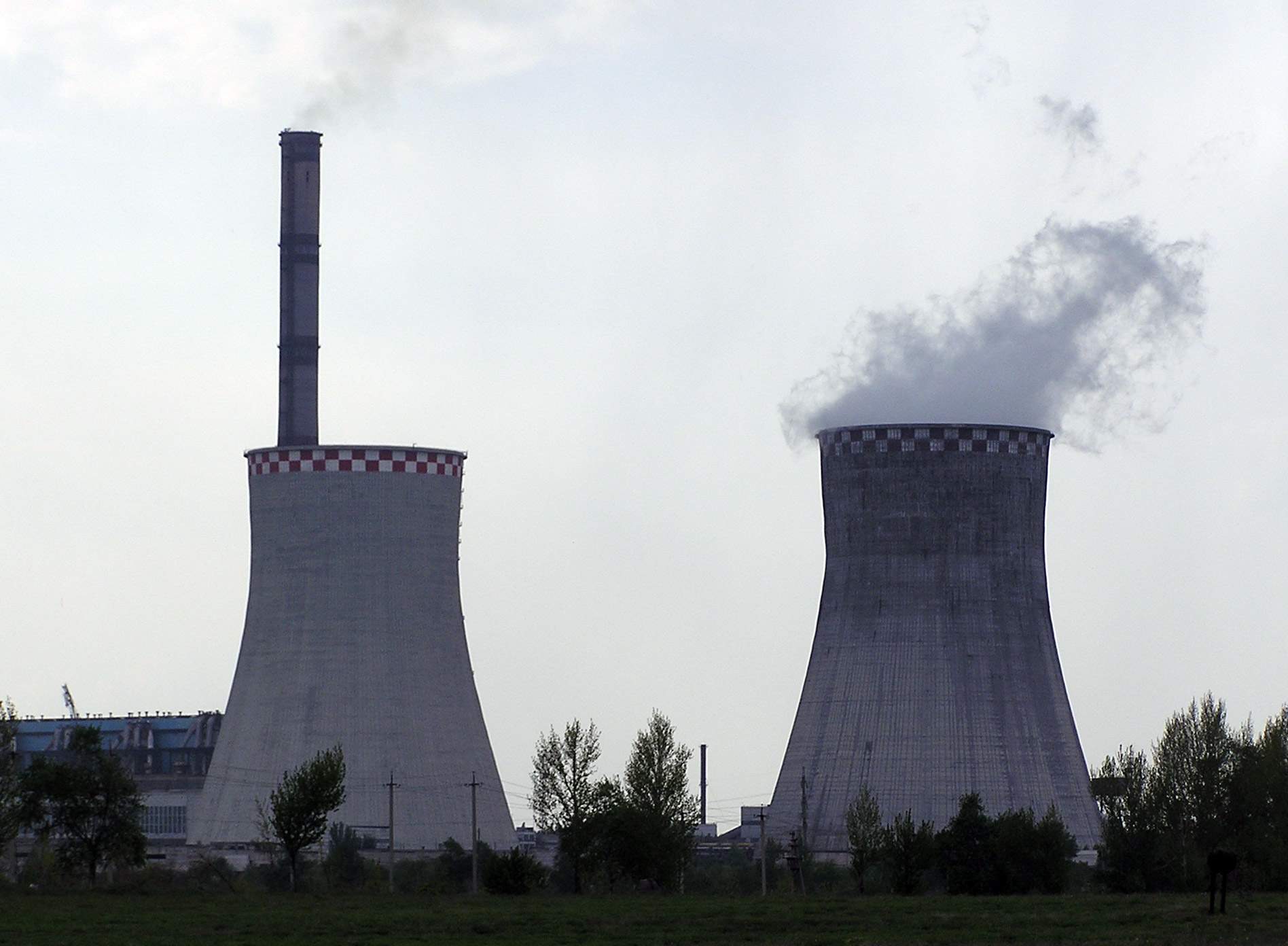 Зугрэс. Градирня Зуевской ТЭС Зугрэс